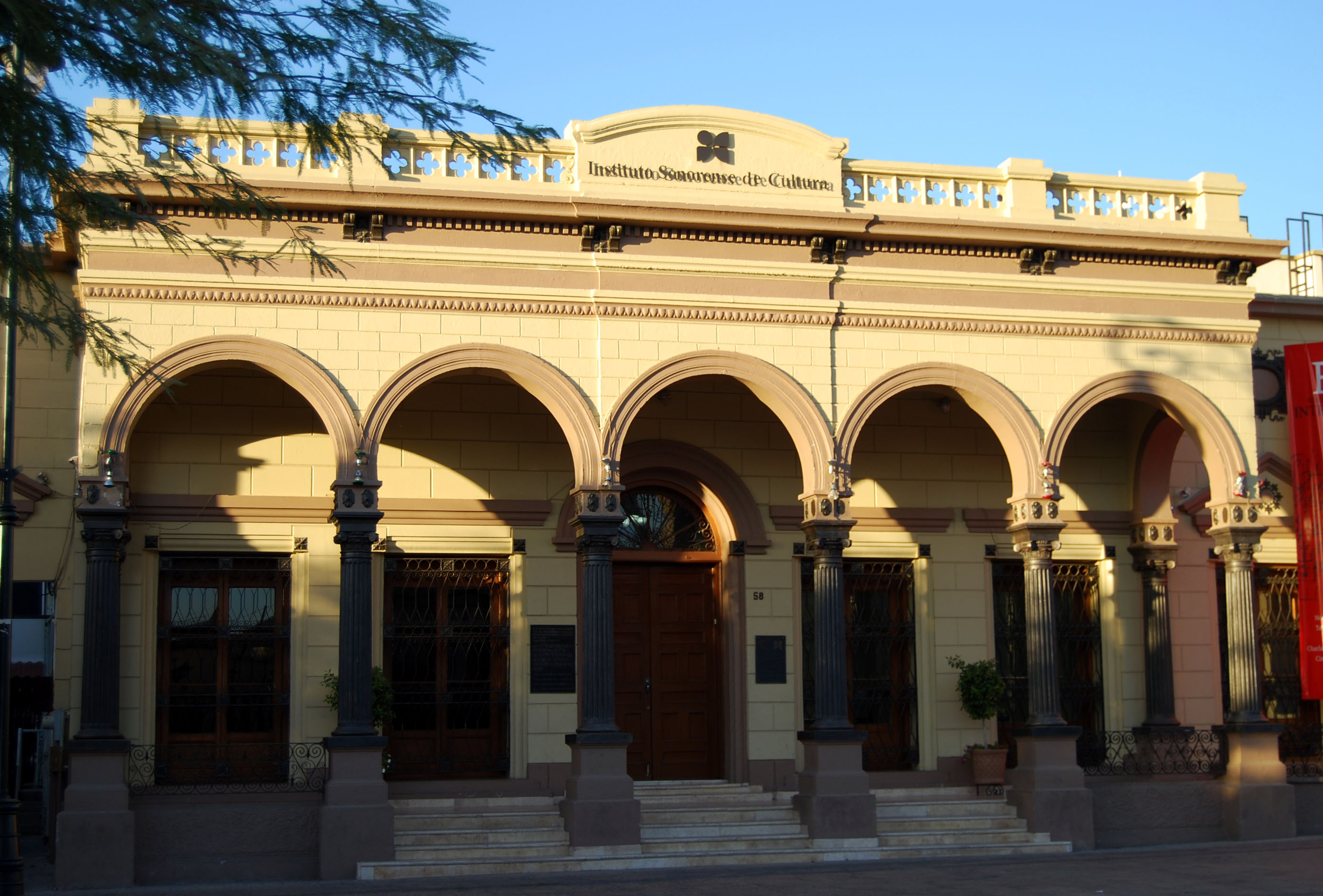 Edificio del Instituto Sonorense de Cultura